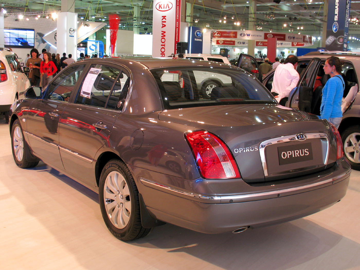 opirus 2008